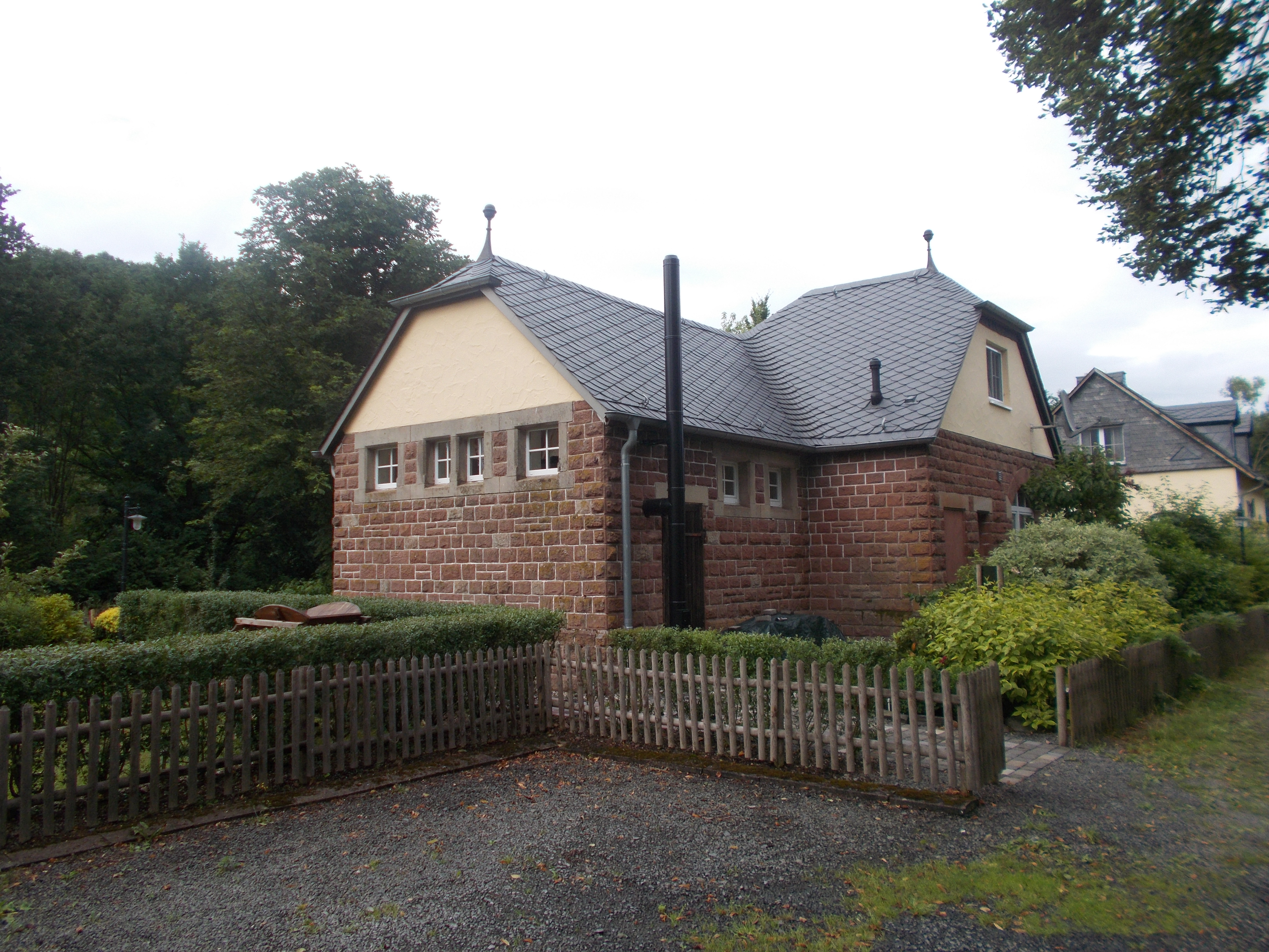 Ferienhaus im ehemaligen Bahnhof Dhronecken